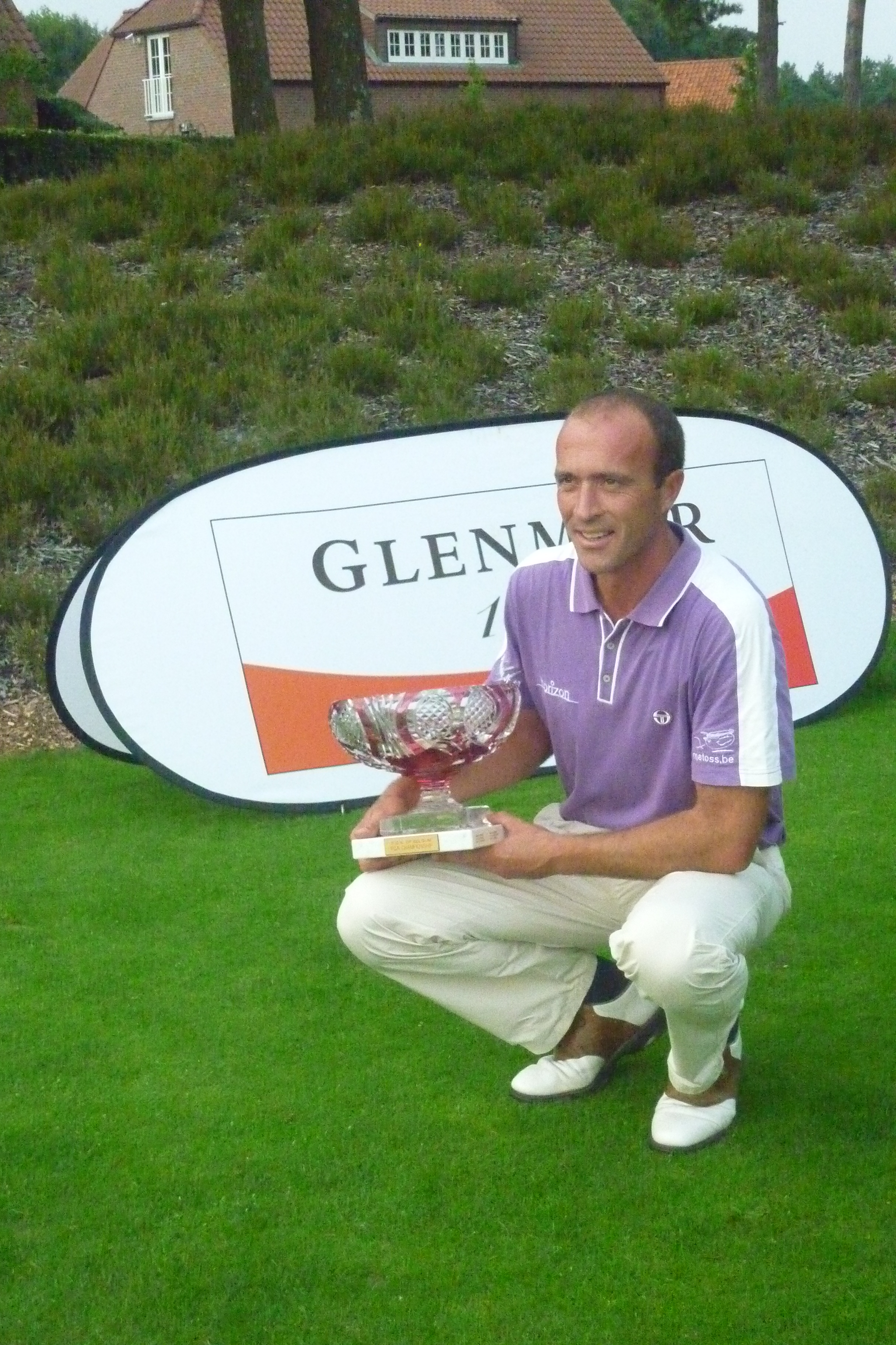 Laurent Richard, winnaar Belgisch PGA Kampioenschap 2011